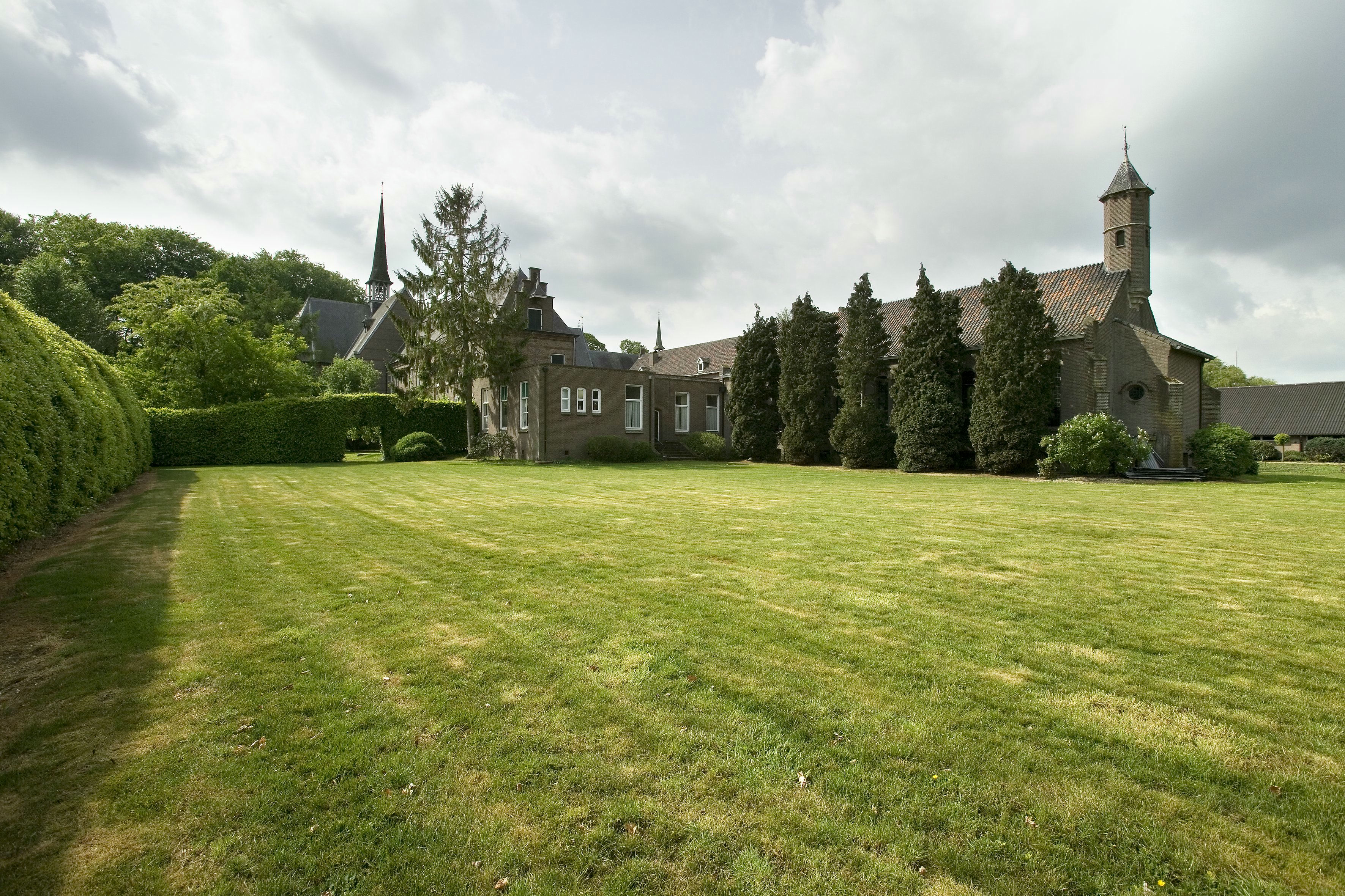 Abdij Sion: Overzicht achterzijde van het kloostercomplex